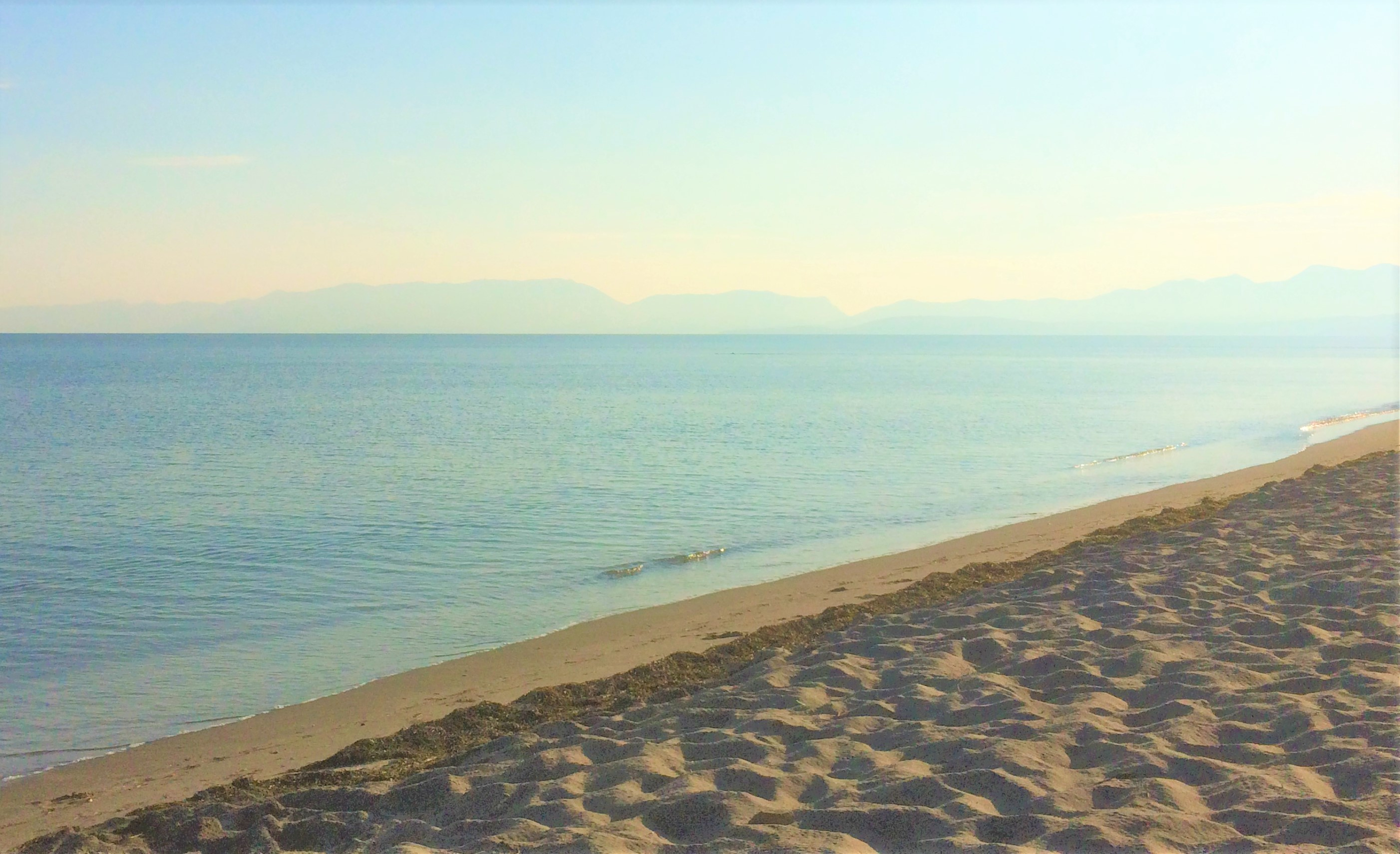 Κυανή Ακτή, Αστέρι Λακωνίας